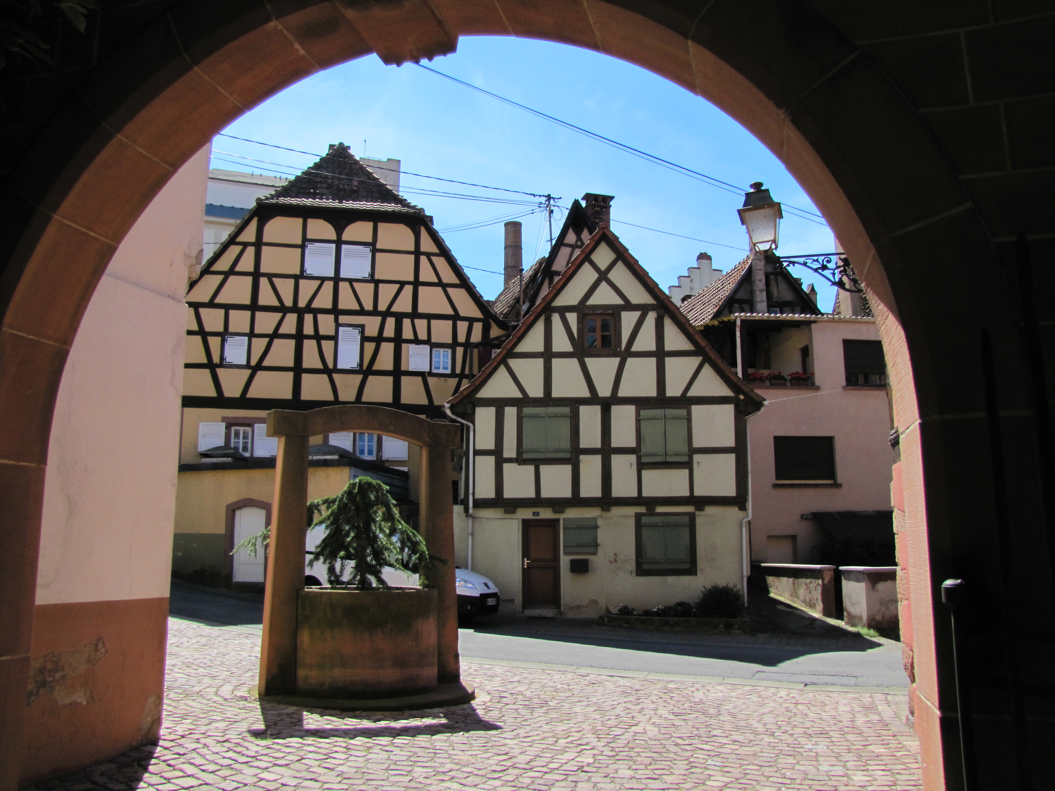 Alsace, Bas-Rhin, Pfaffenhoffen, Porche de la cour du presbytère catholique.